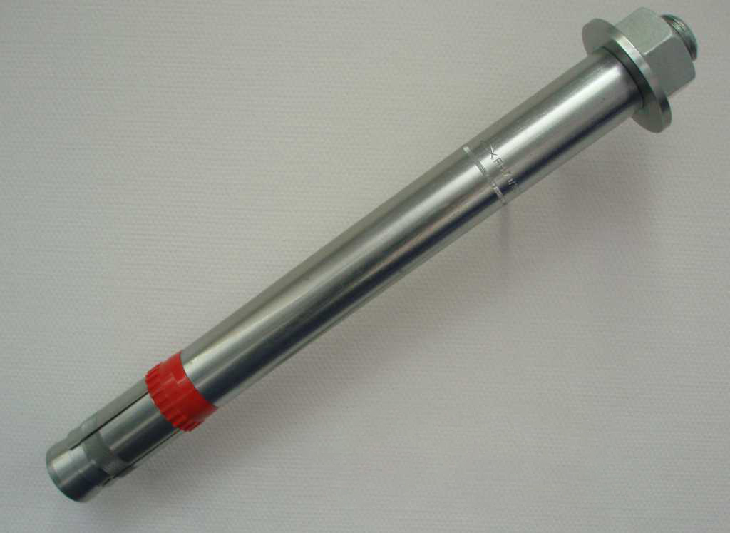 Fischer Anchor FH 70/150